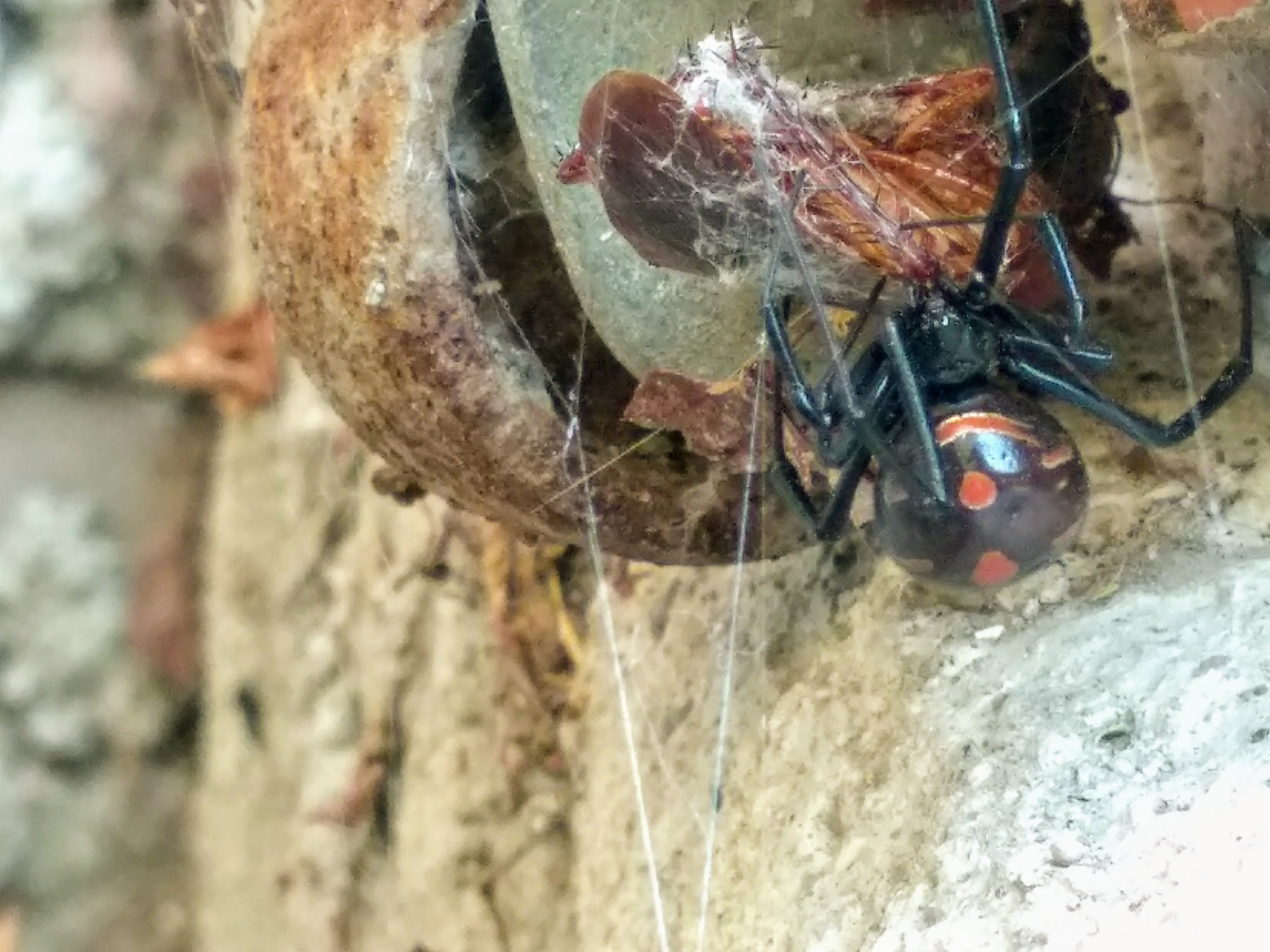 Es una viuda negra devorando a una cucaracha